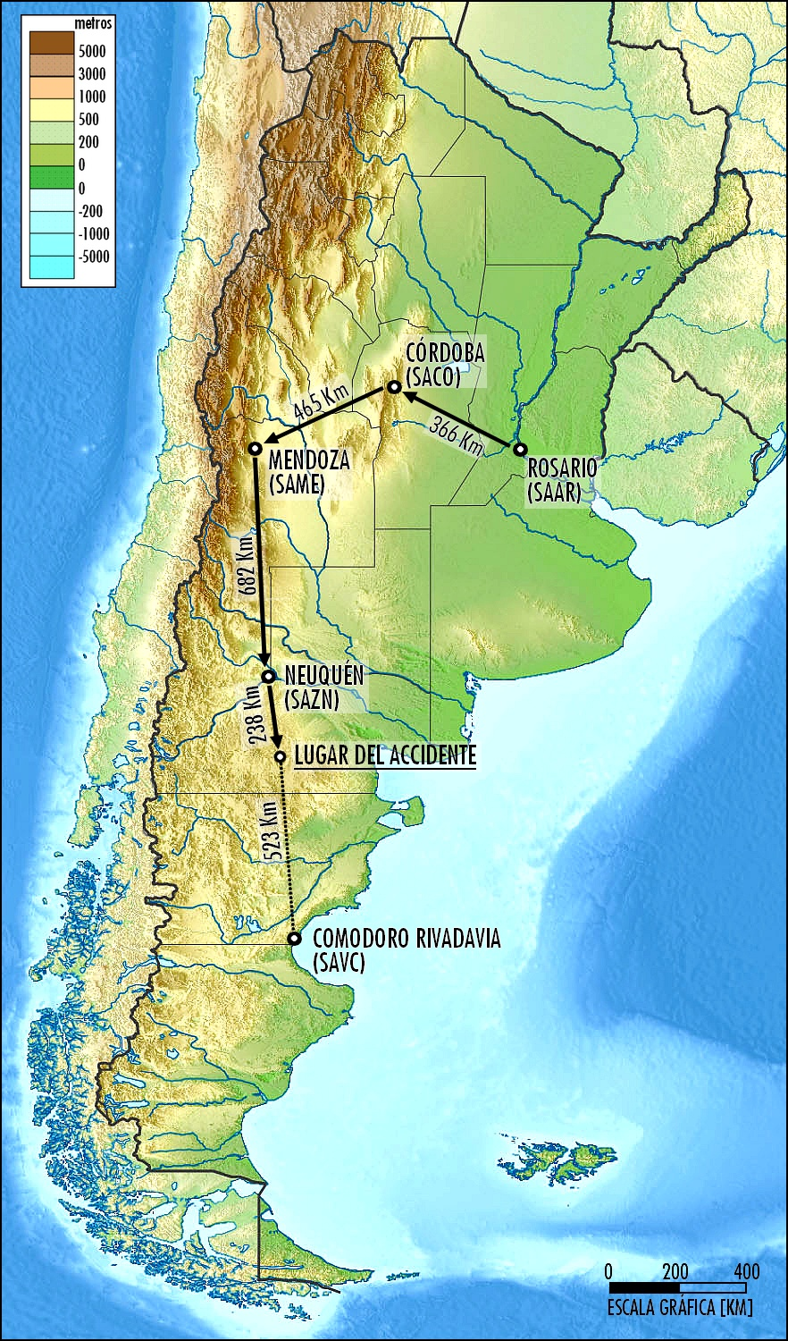 Mapa que muestra el vuelo OST 5428 de Sol Lineas Aéreas